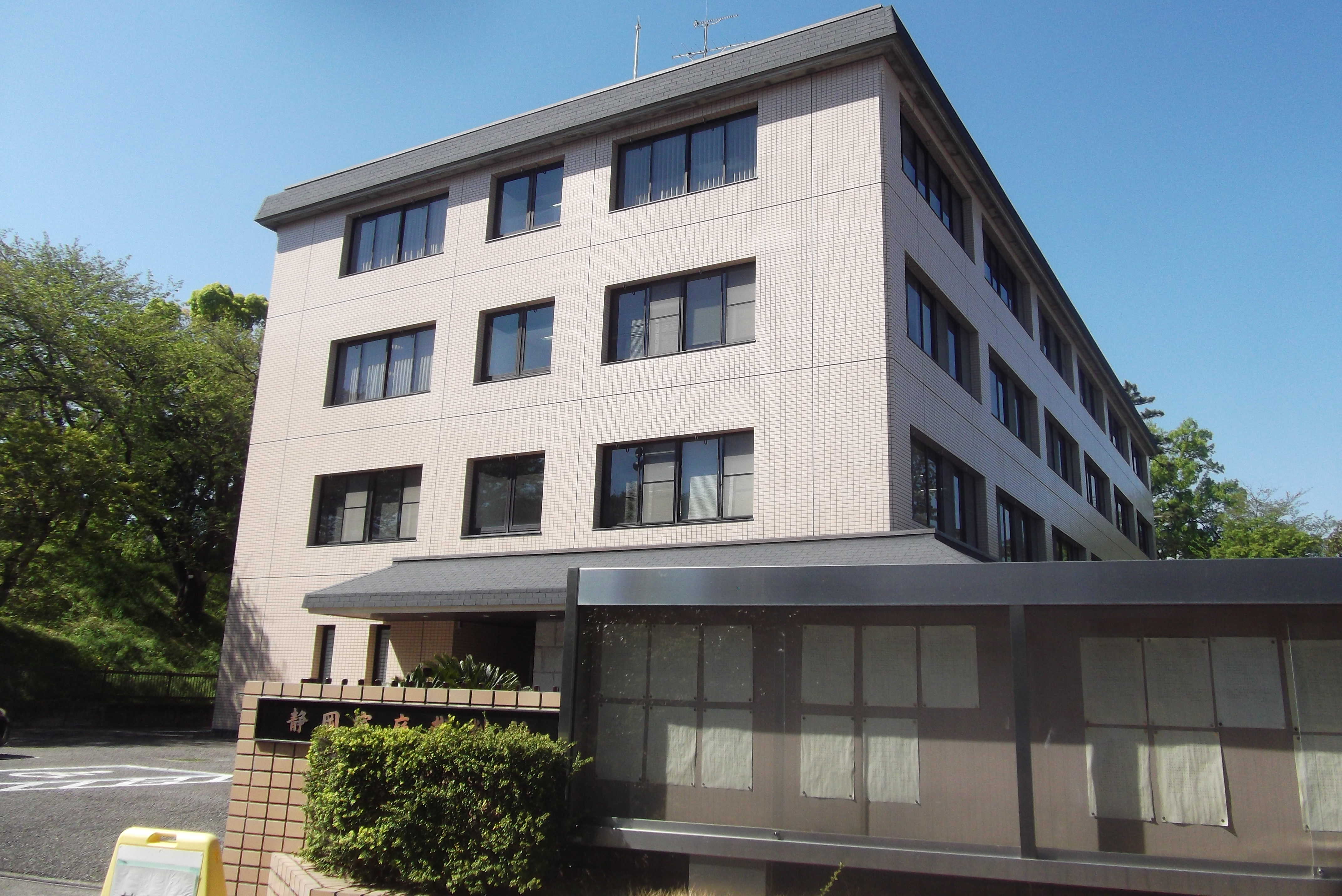 静岡市葵区、静岡家庭裁判所。